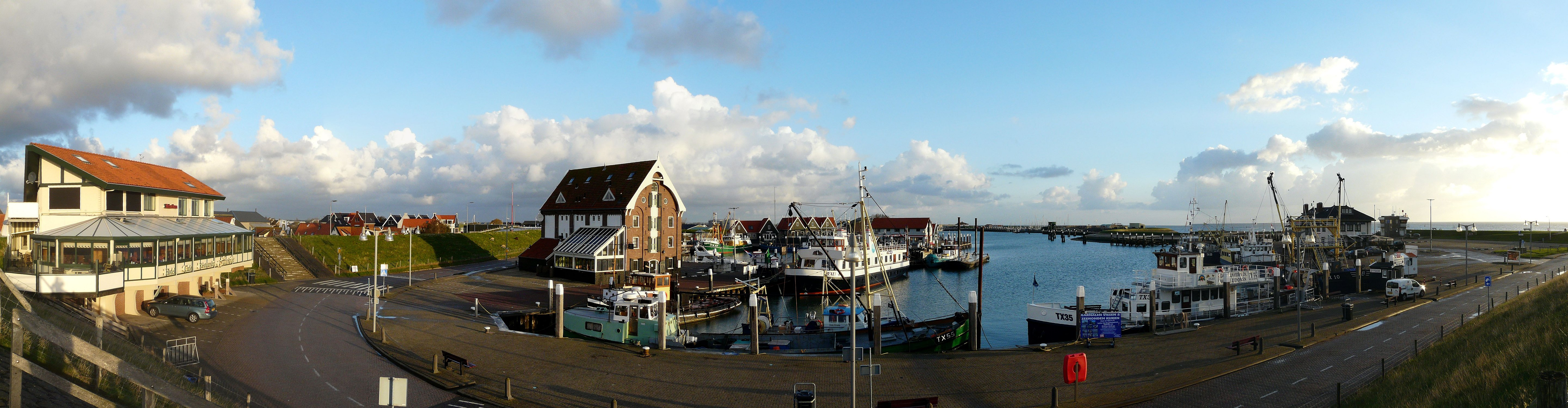 Panorama des Hafens von Oudeschild (Texel, Niederlande)